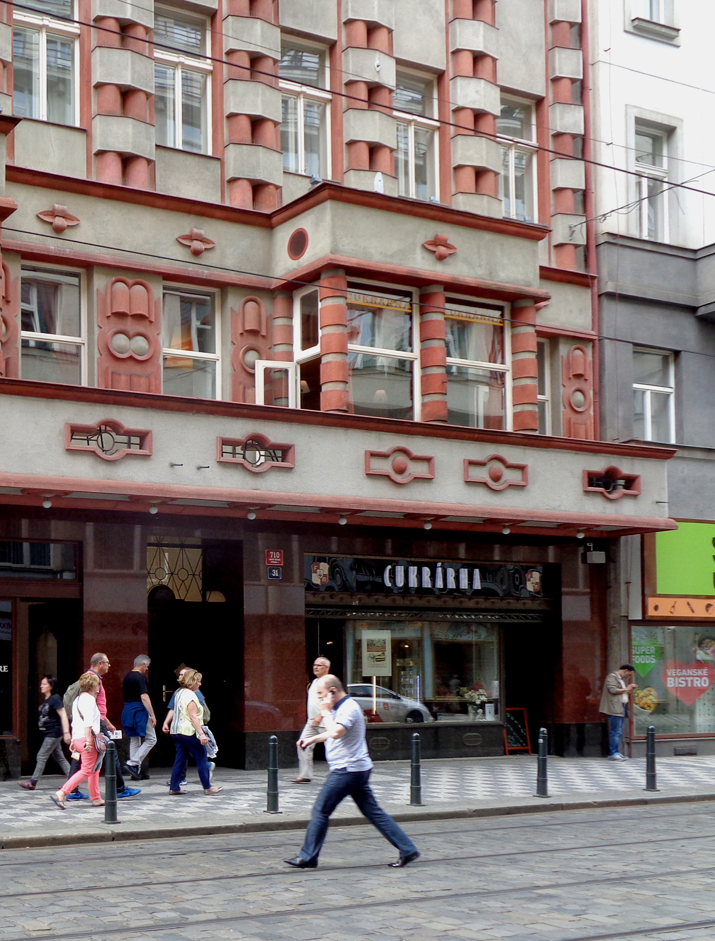 Cukrárna obnovená